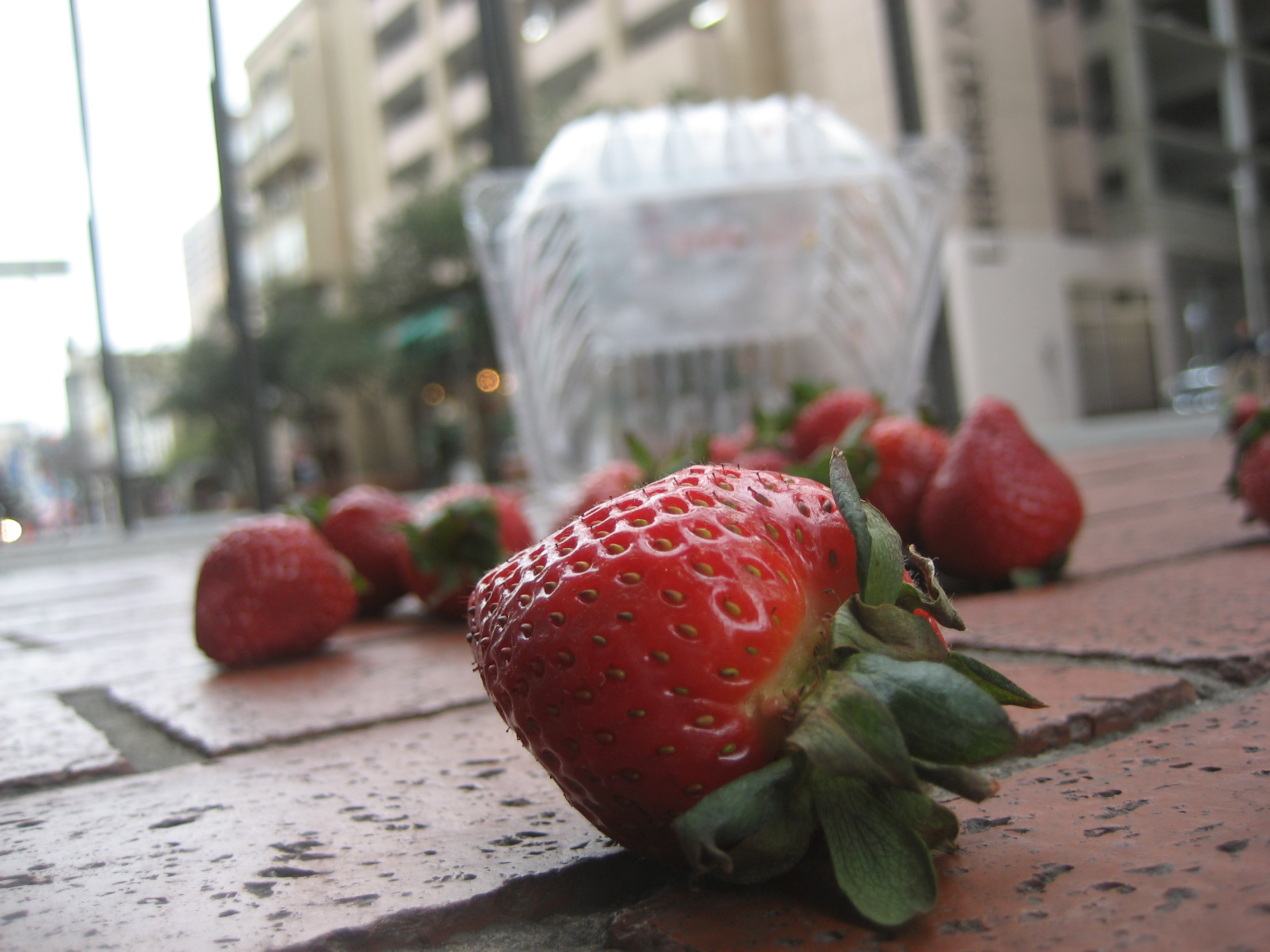 Spilled strawberries